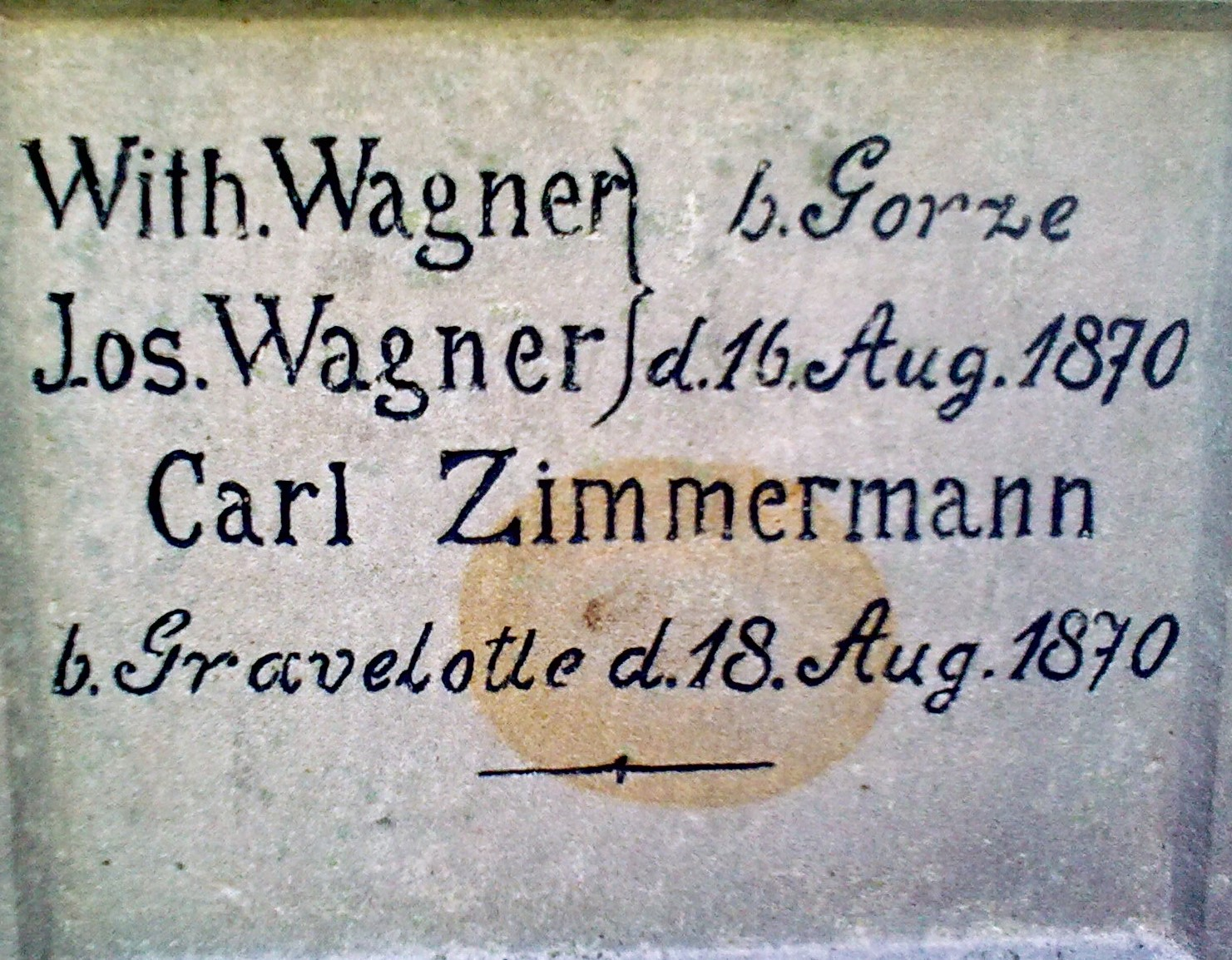 Krajanów. Napis na pomniku ofiar wojny francusko-pruskiej